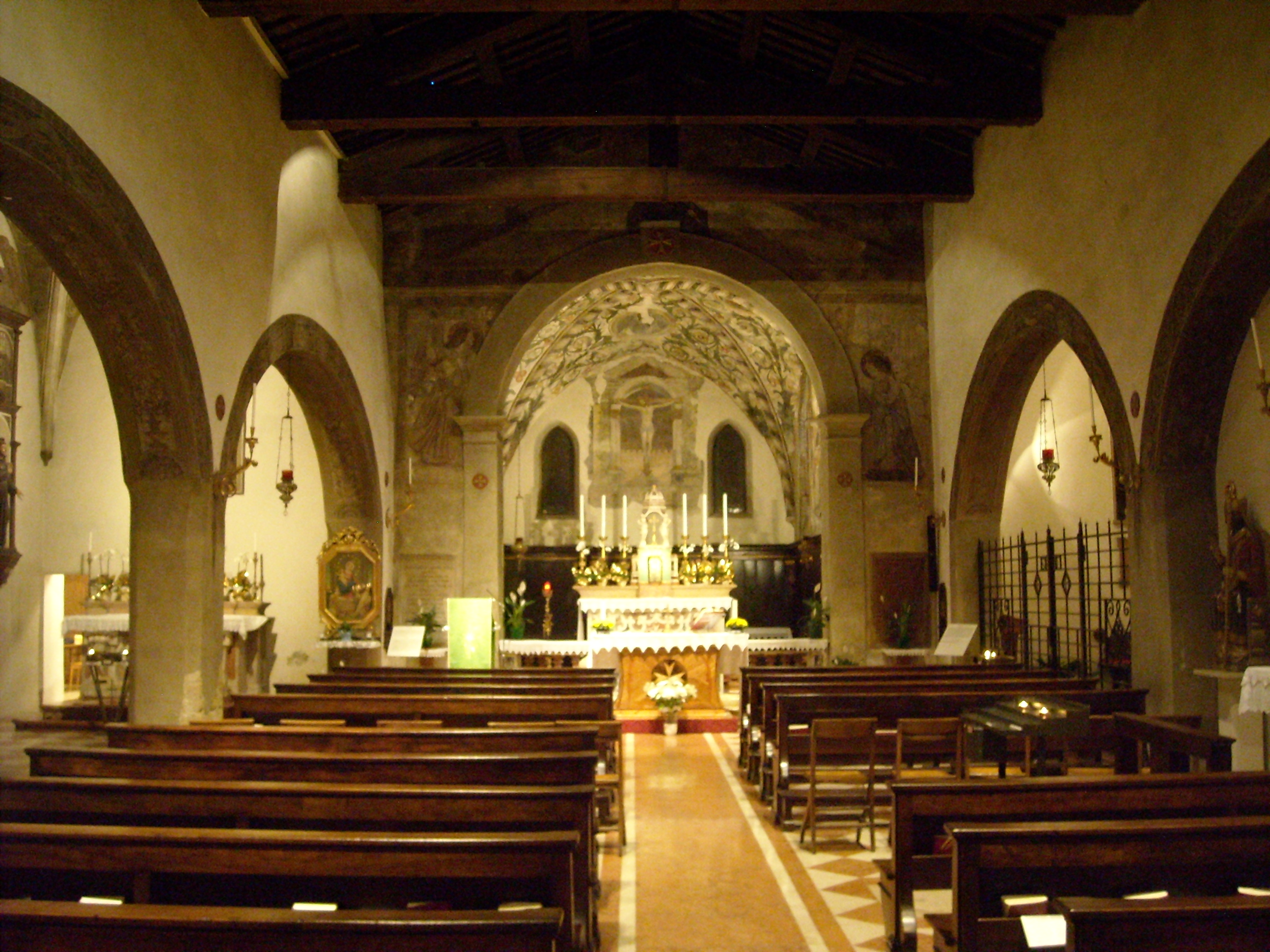 Veduta della navata centrale della chiesa di Santa Toscana a Verona